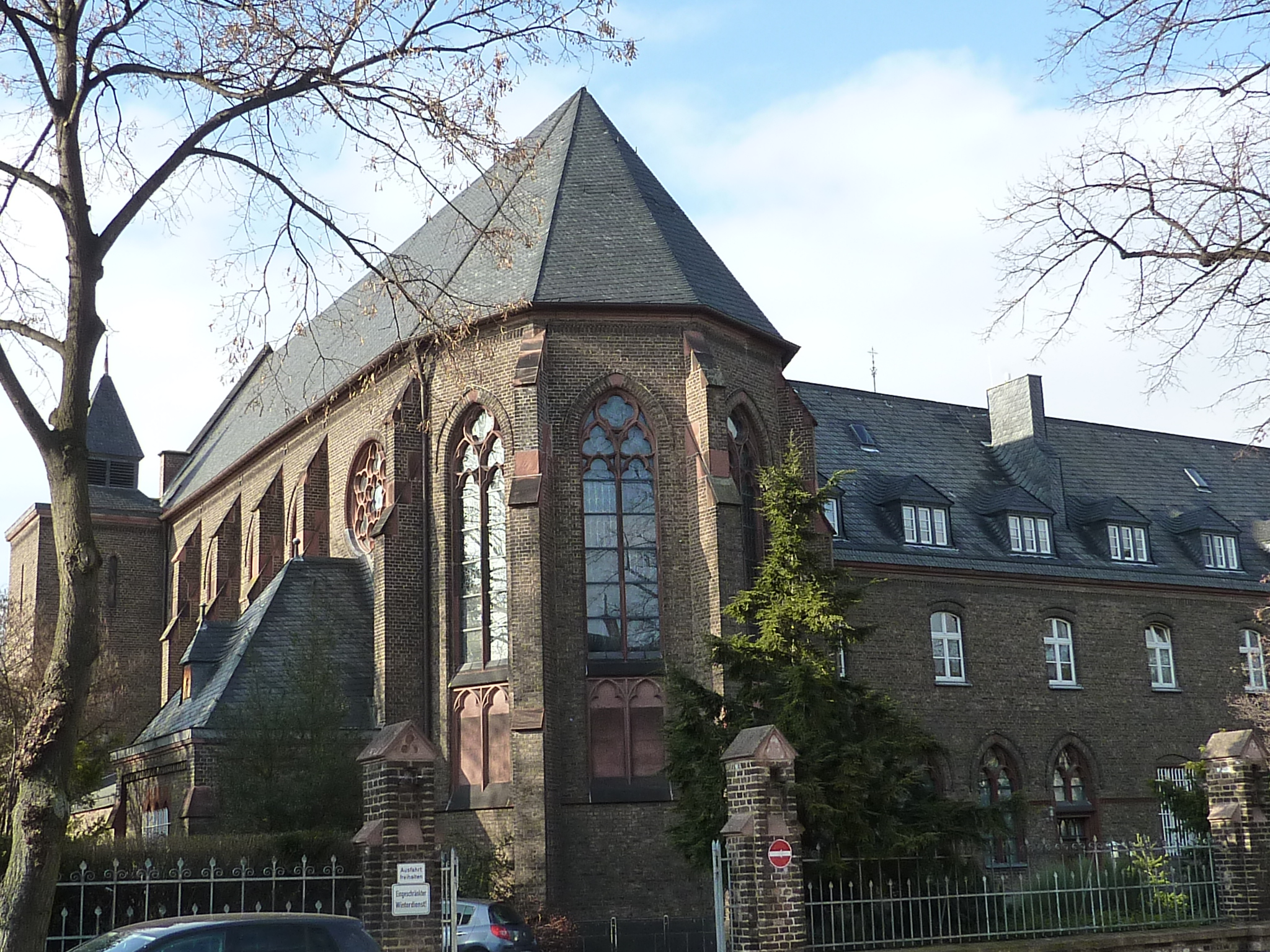 Herz-Jesu-Kloster (Köln-Raderberg) This is the photograph of an architectural monument. It is part of the list of cultural monuments of Köln, no. 1095